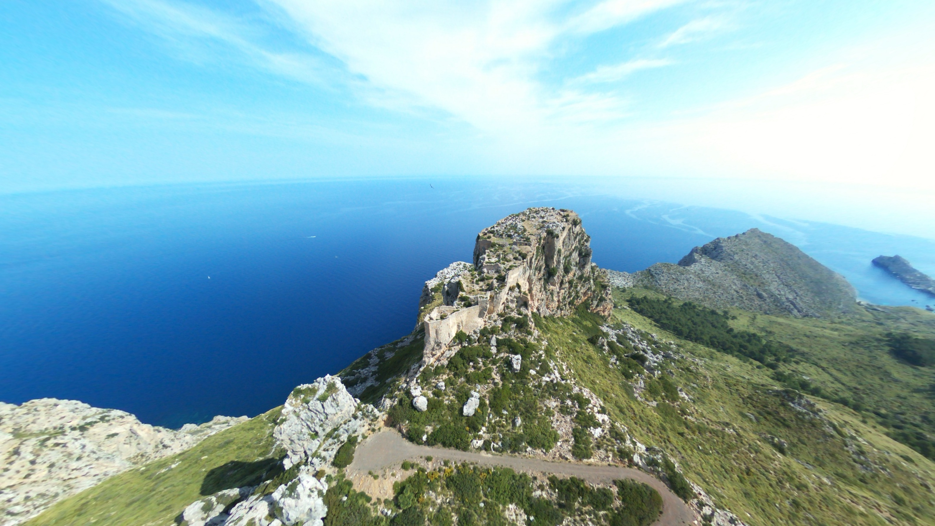 Castillo del Rey, Pollensa, Mallorca, desde el sur.